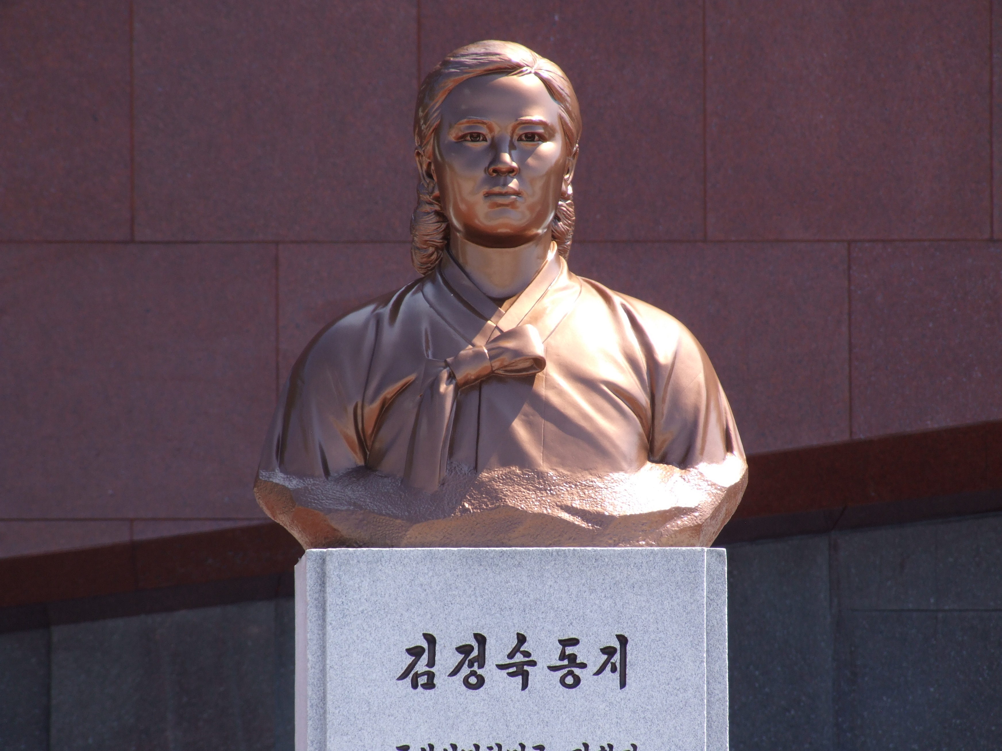 Friedhof der Revolutionshelden in Pjöngjang